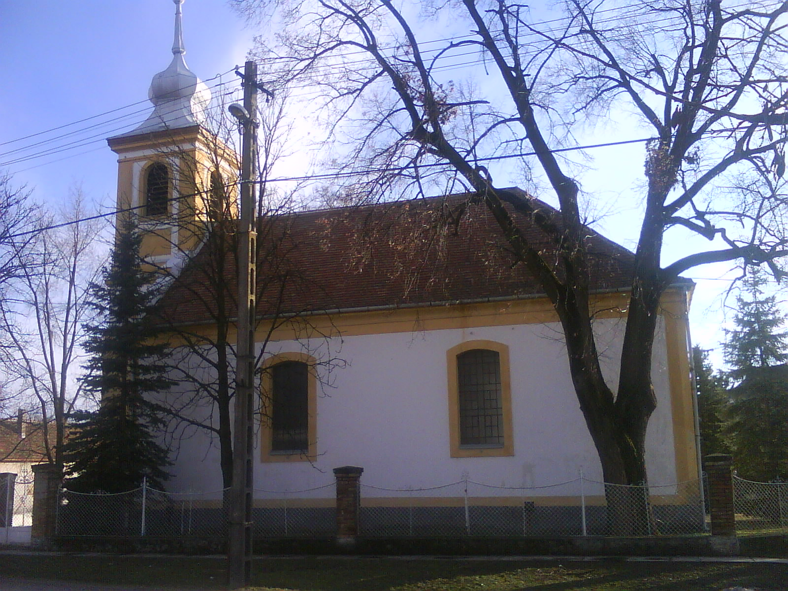 Csomádi evangélikus templom. A késő barokk stílusú templom 1783 és 1784 között, tornya 1799 és 1800 között épült